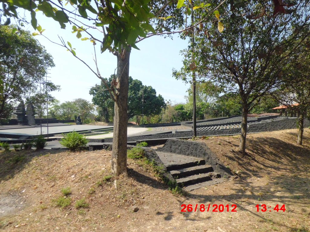 Panggung Terbuka Bernuansa Kerajaan Majapahit "Candra Wilwatikta" Pandaan